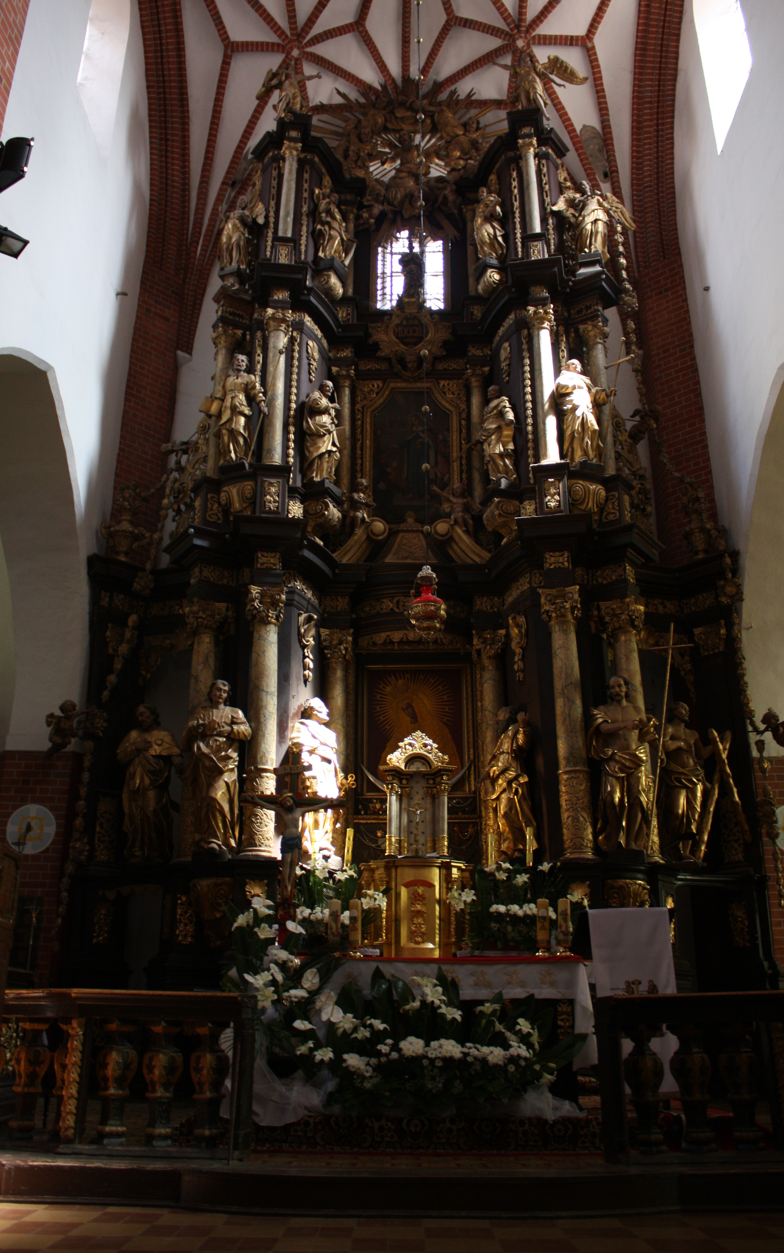 Orneta, ul. Kościelna 3 - kościół parafialny pw. św. Jana Chrzciciela (rokokowy ołtarz z 1744 r.)